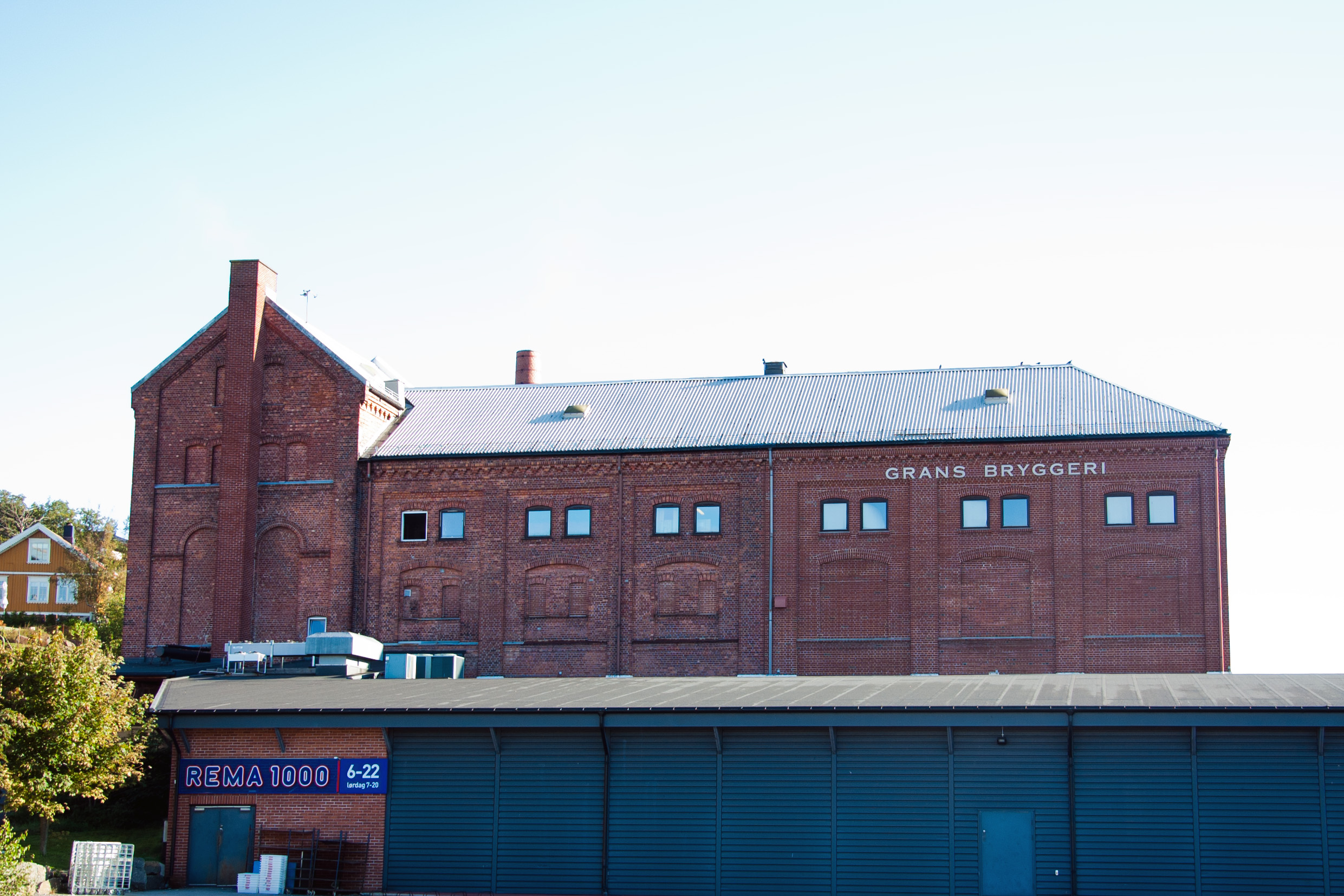 Grans bryggeri, Sandefjord